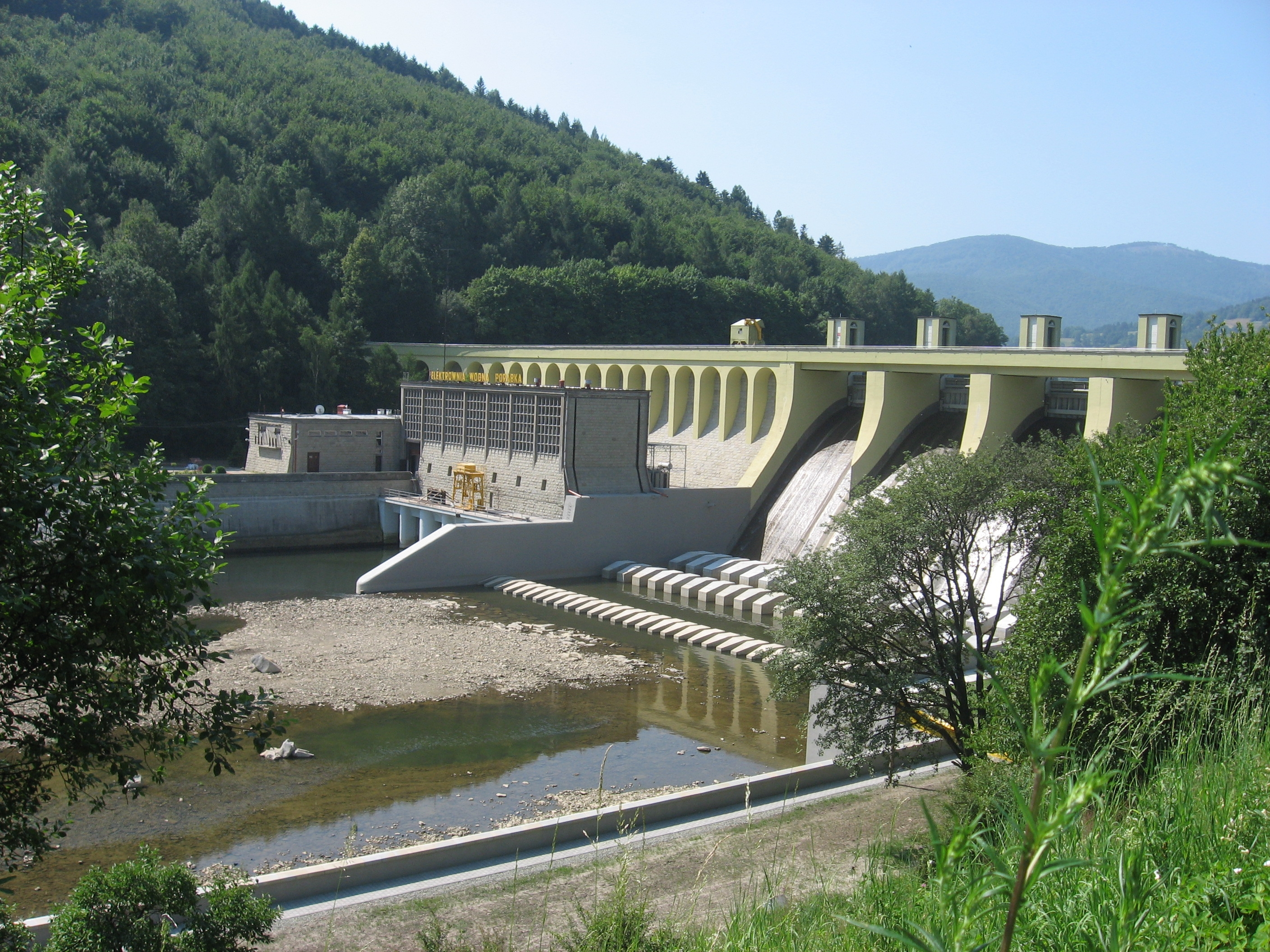 Zdjęcie przedstawiające zaporę wodną i elektrownię wodną w Porąbce